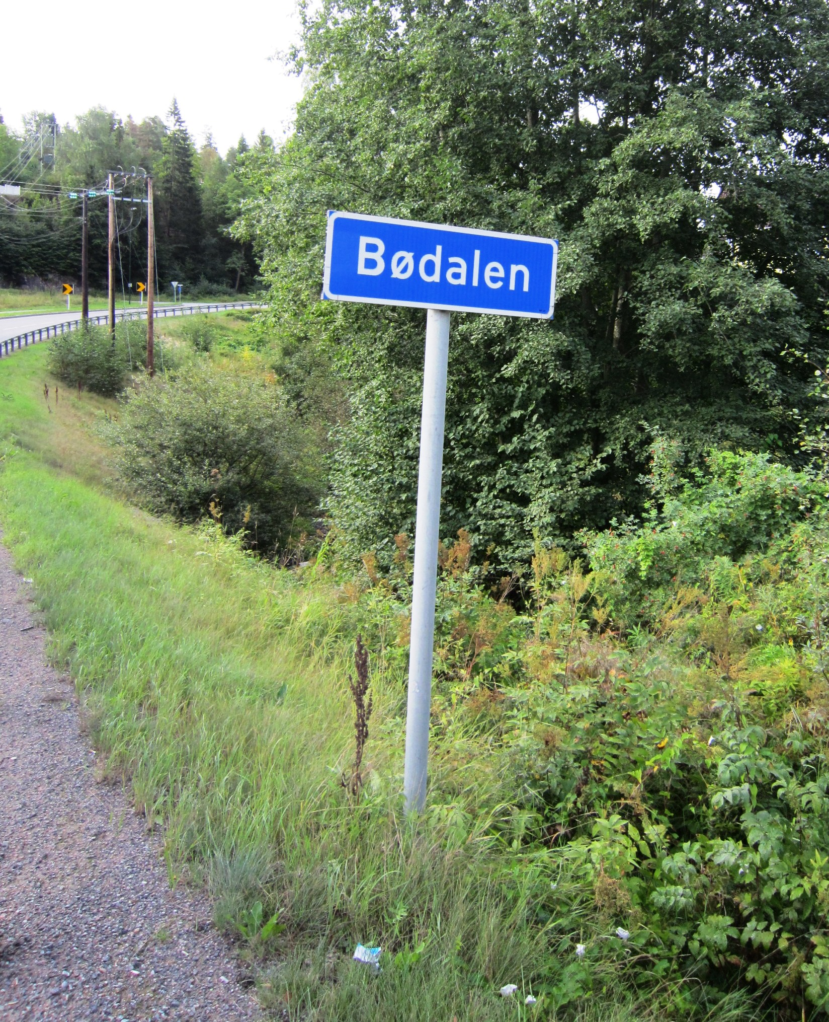 Primær fylkesvei 165 ved Bødalen sør for Slemmestad i Røyken kommune